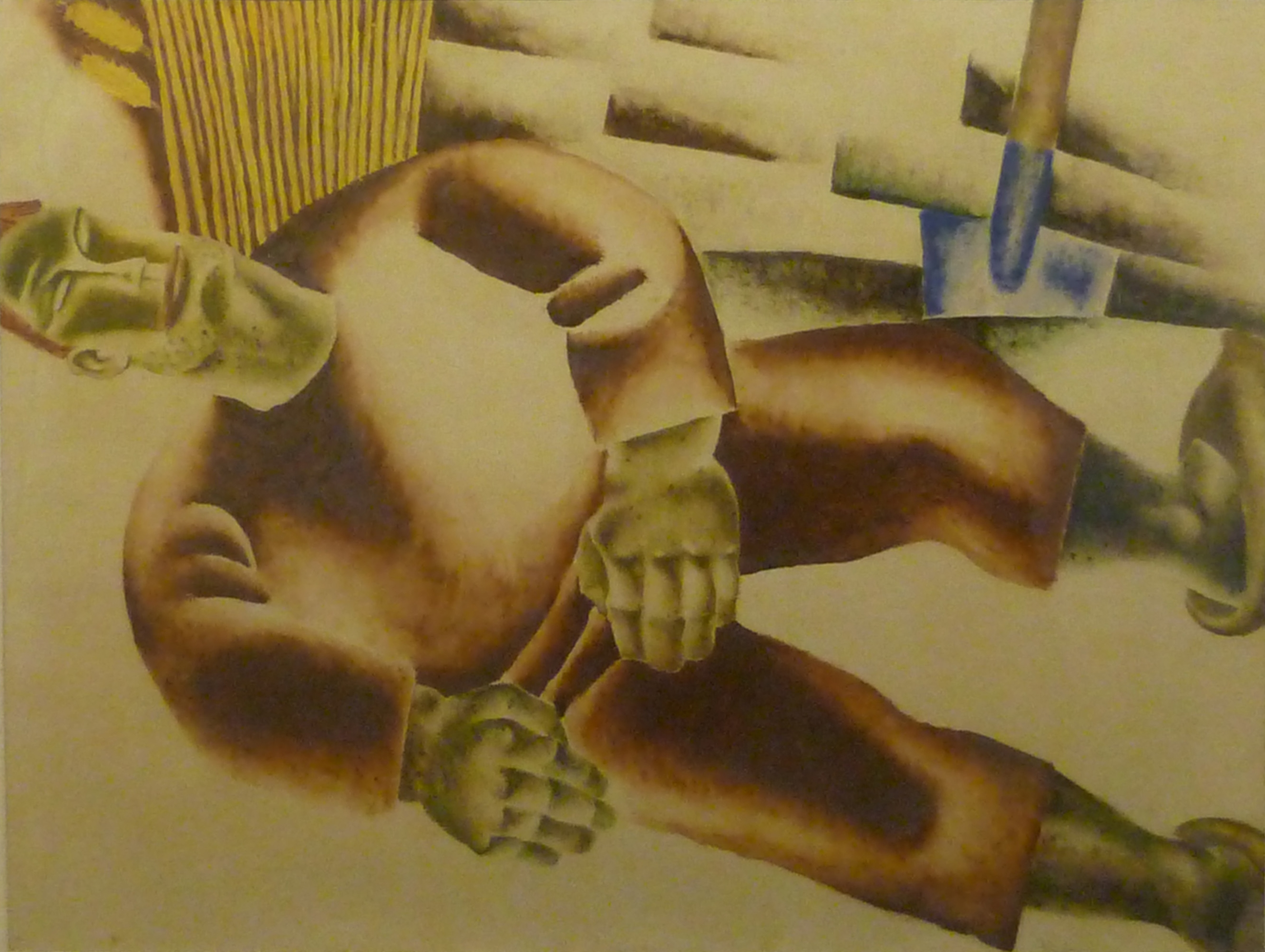 Frits Van den Berghe (1925) - Slapende boer; gouache op papier; collectie Mu.ZEE, Oostende